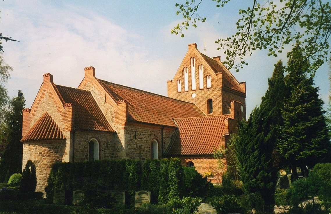 Farum Kirke, Farum Sogn, Furesø Kummune